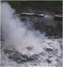 Ablöschen eines Magnesium Brandes mit Furex-MagMetall